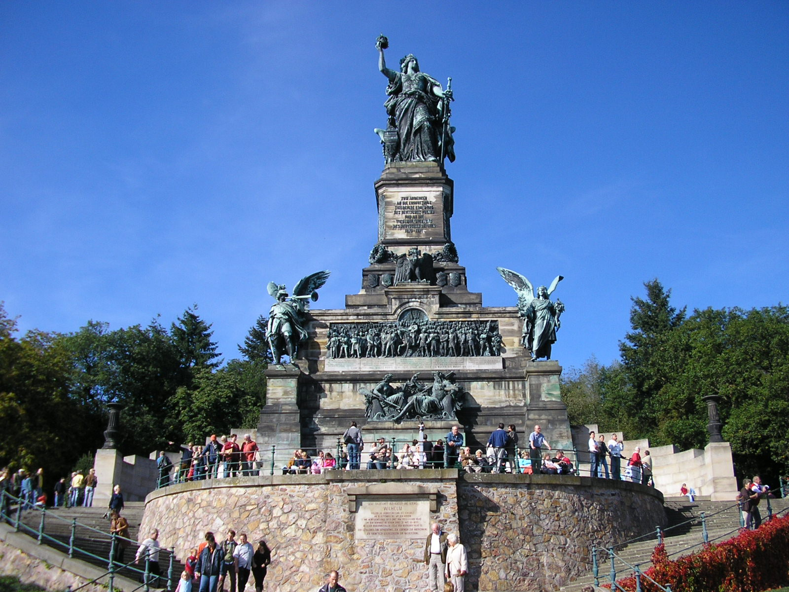 Niederwald Memorial, near Rüdesheim/ Germany